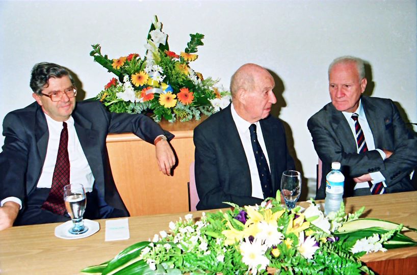 נשיאי בית המשפט העליון מאיר שמגר משה לנדוי אהרון ברק באירוע לכבוד השופט לנדוי